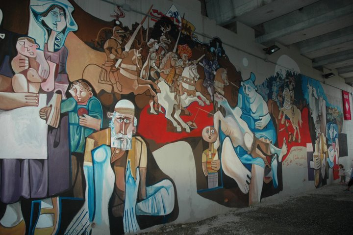 Murale realizzato da Francesco Del Casino per i donatori di sangue AVIS Taverne d'Arbia - Siena 13 settembre 2008